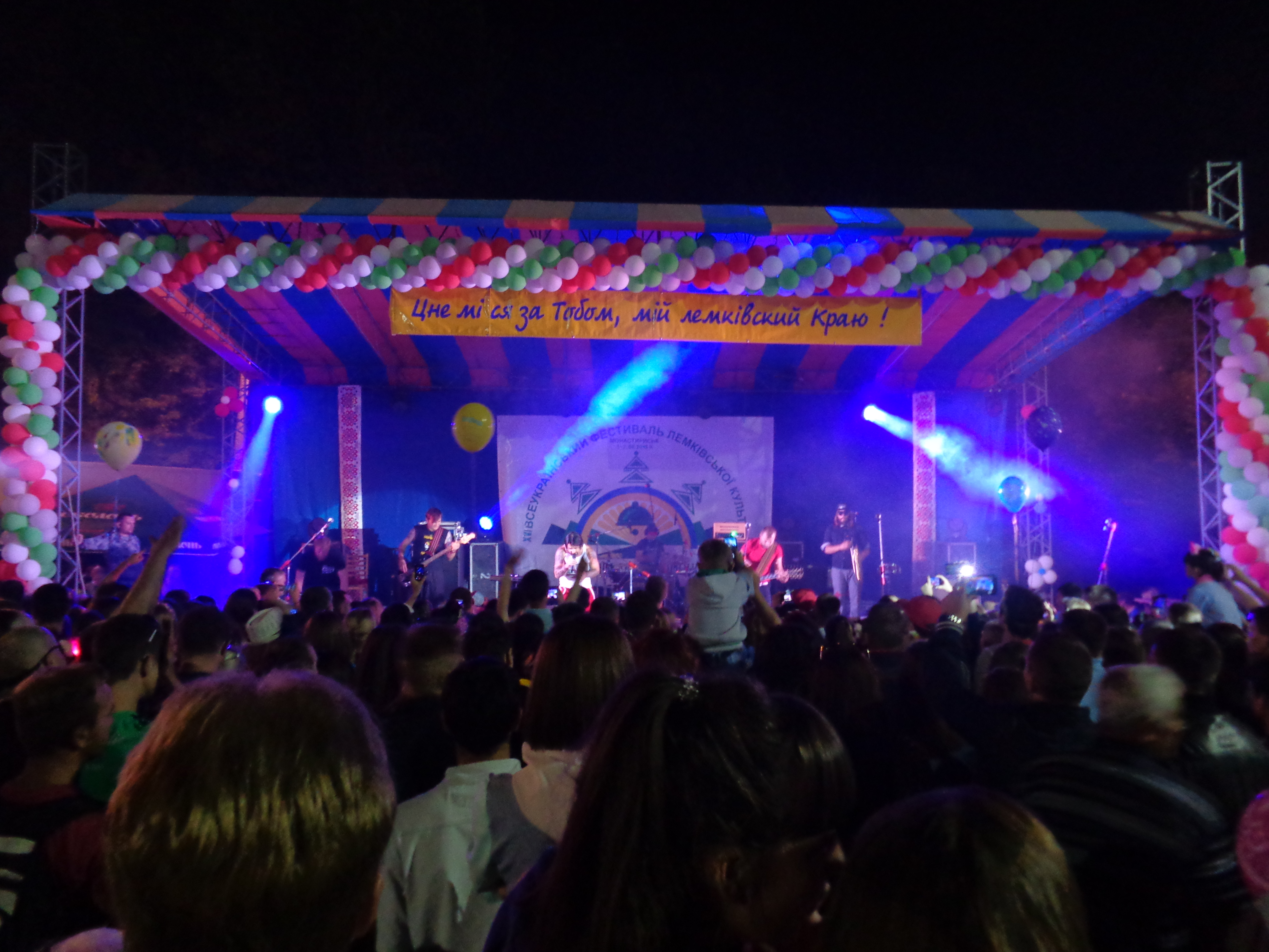 "Kozak System" на фестивалі лемківської культури "Дзвони Лемківщини".